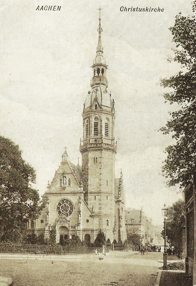 Scan einer alten Aachener Ansichtskarte aus dem eigenen Besitz; Motiv: ehemalige ev. Christuskirche in Aachen, 1893–1896 erbaut